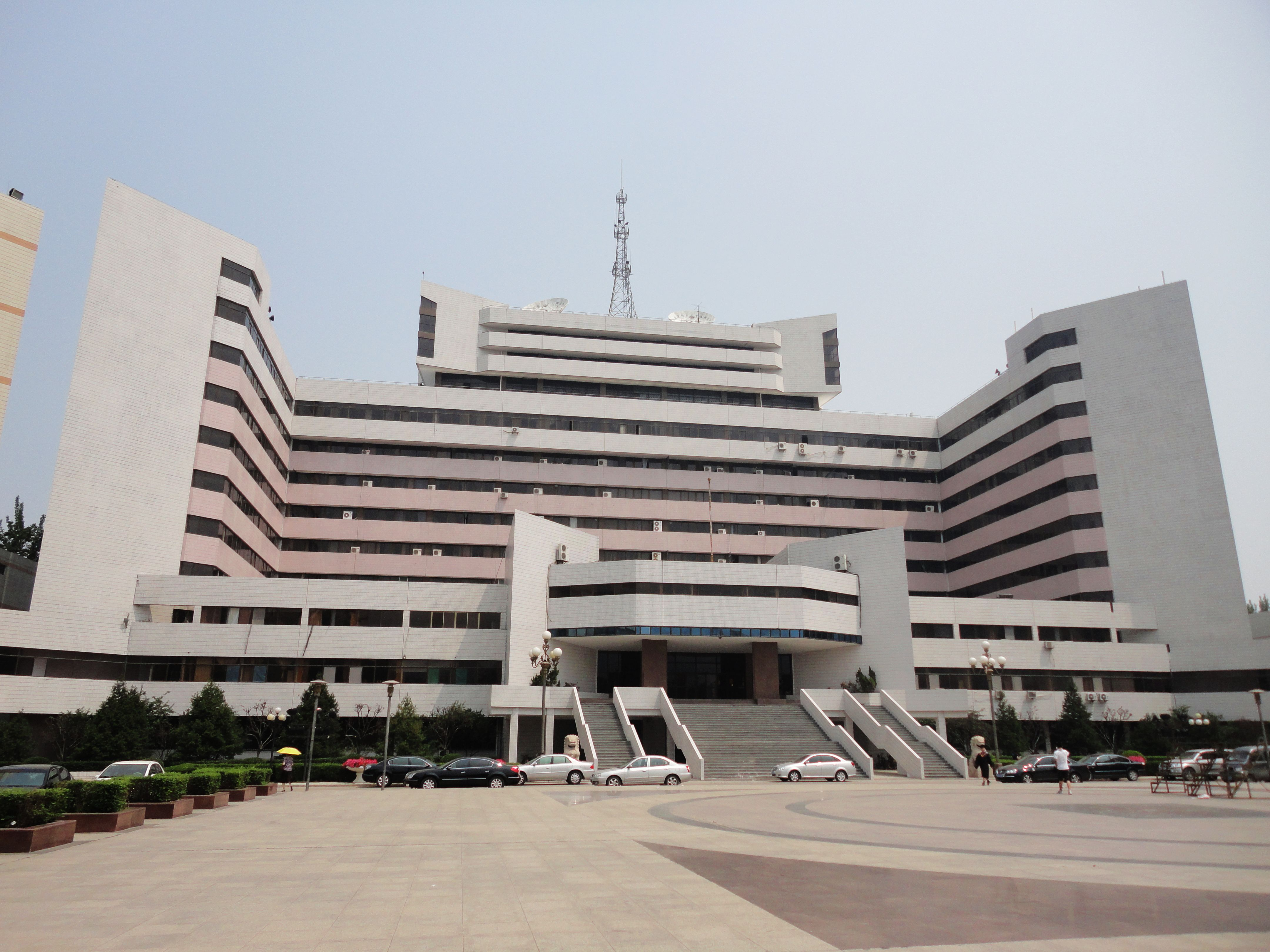 山东大学千佛山校区主楼（原山东工业大学主楼）。